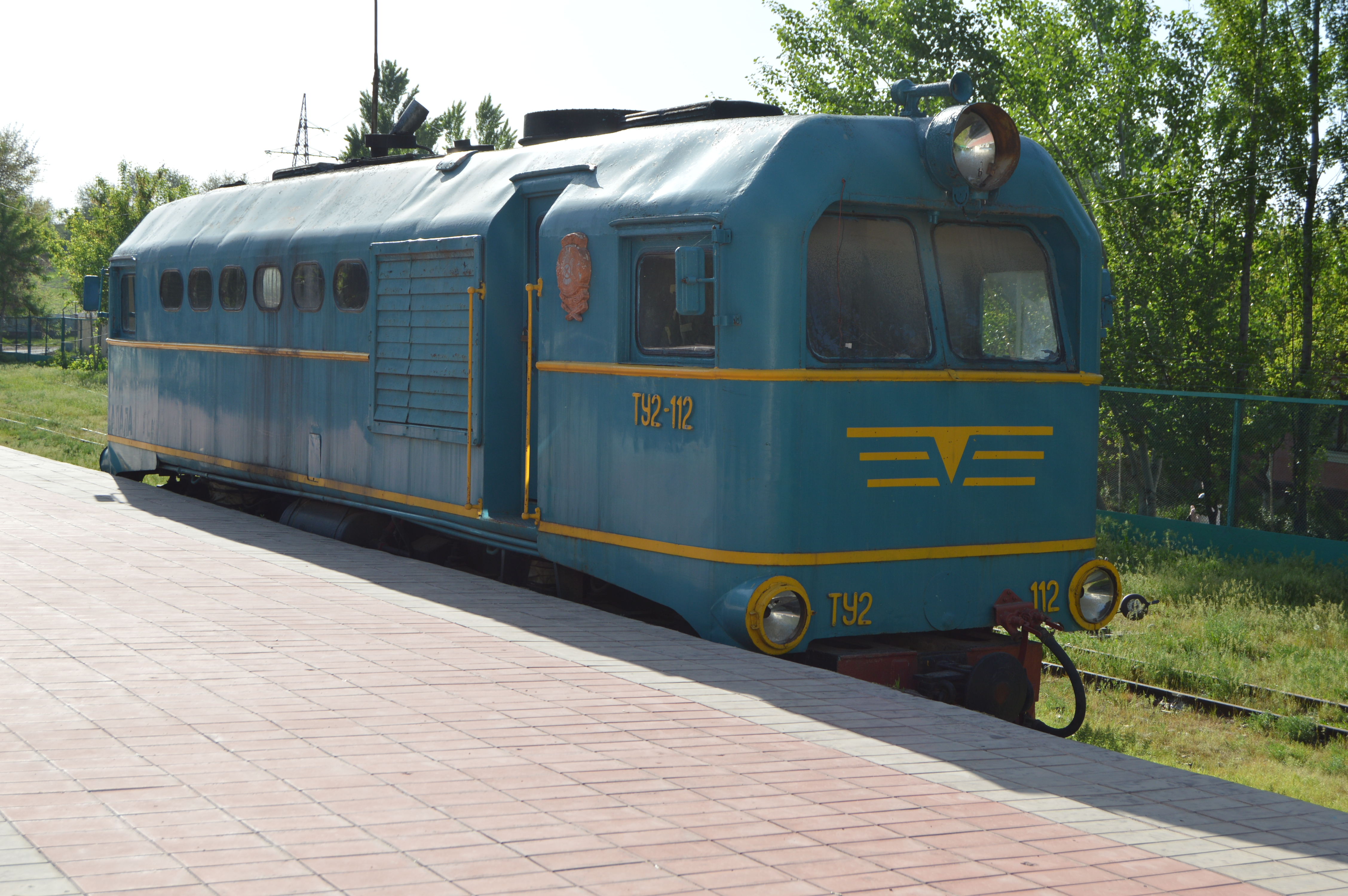 Узкоколейный тепловоз ТУ2-112 на ДЖД в Шымкенте,Казахстан